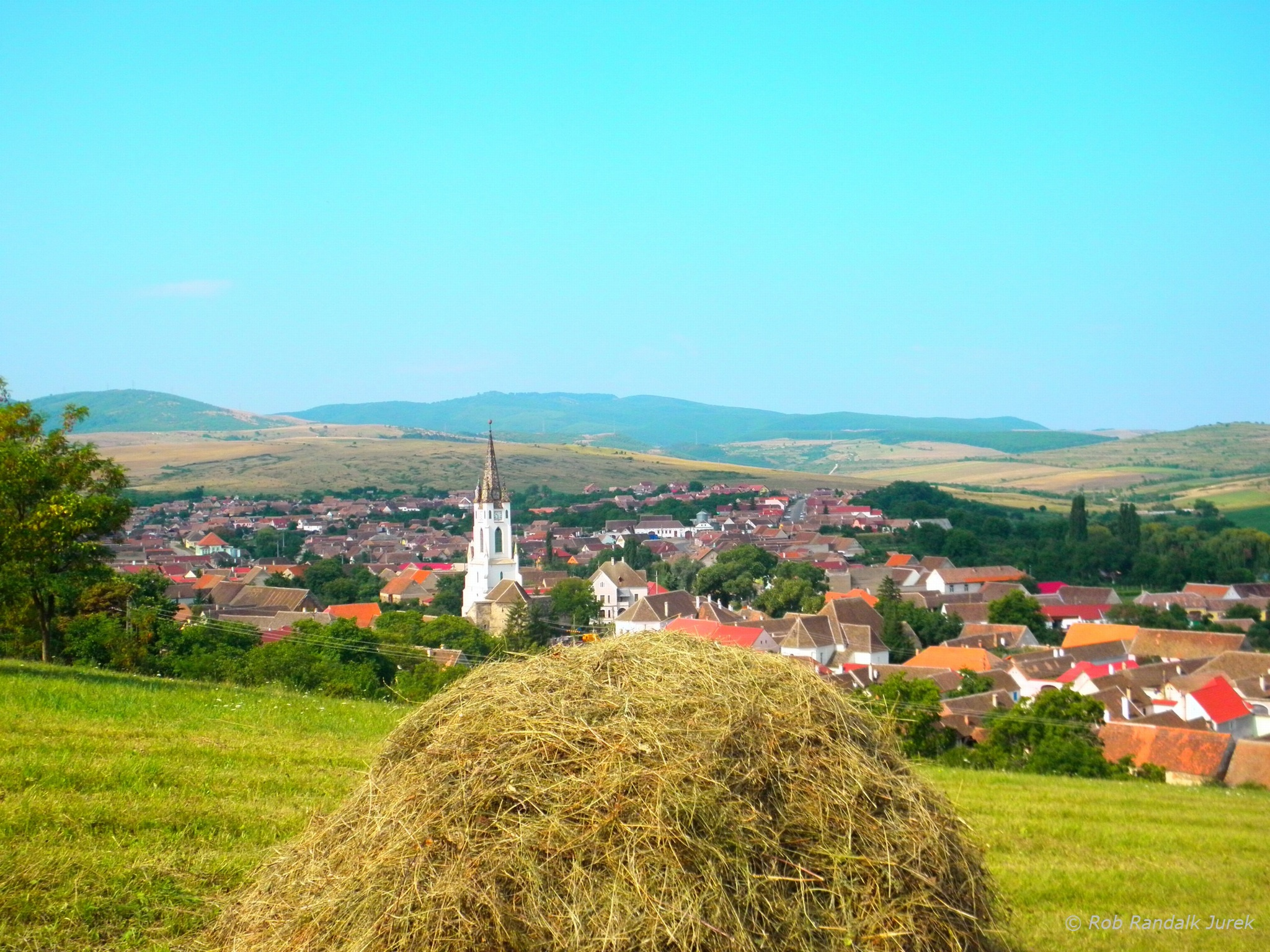 Garbova